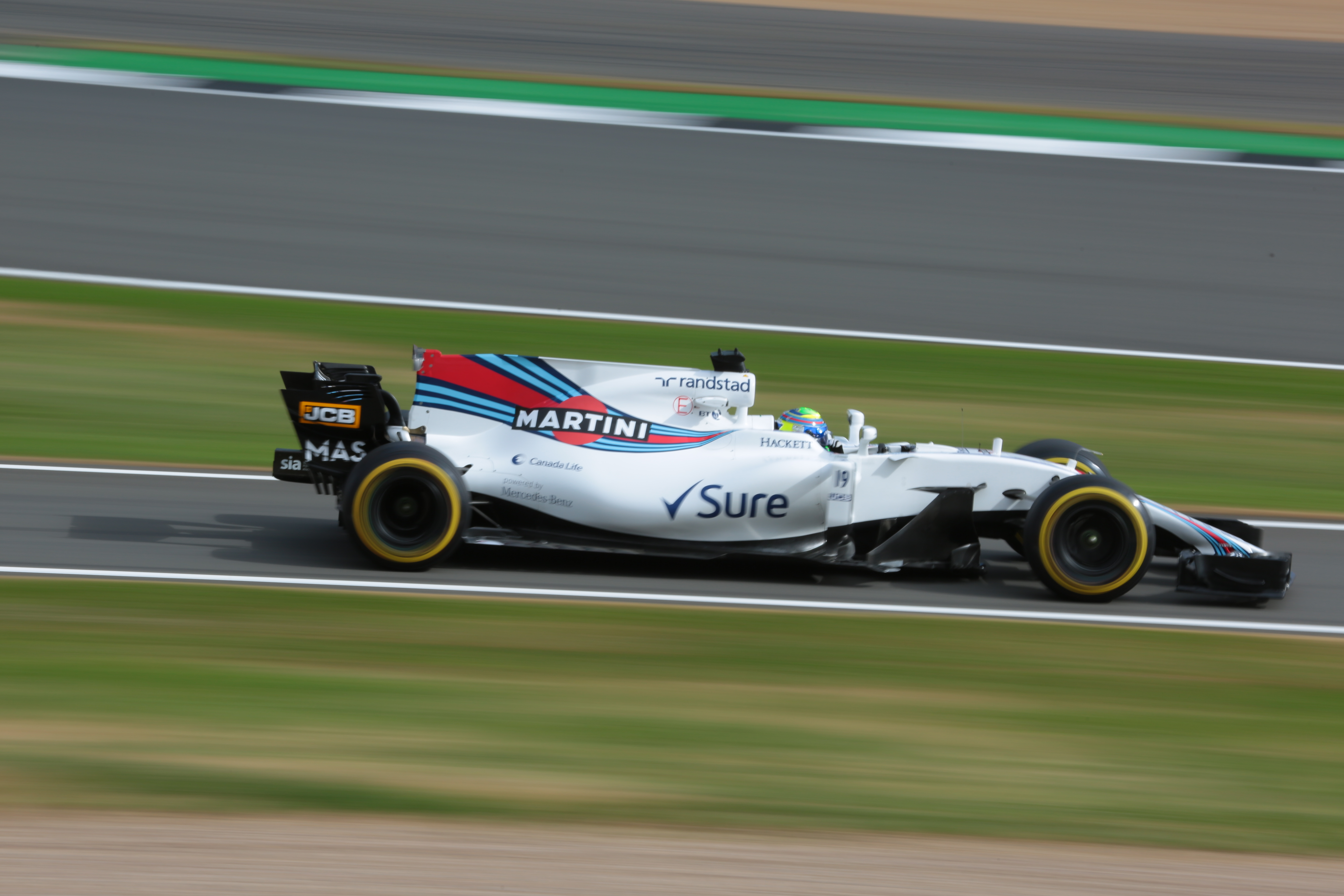 f1